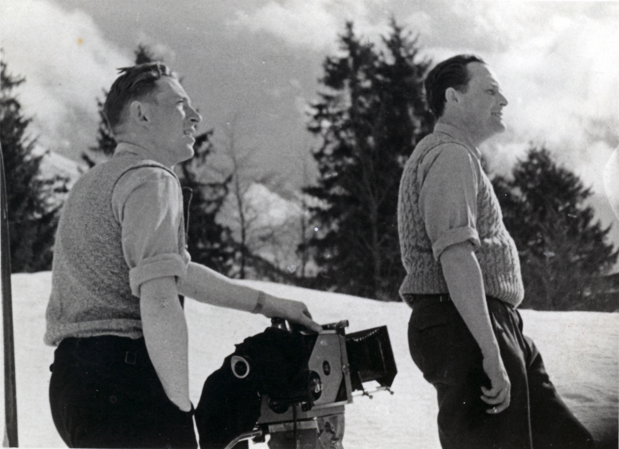 während der Dreharbeiten zu einem Spielfilm in den 1950er Jahren